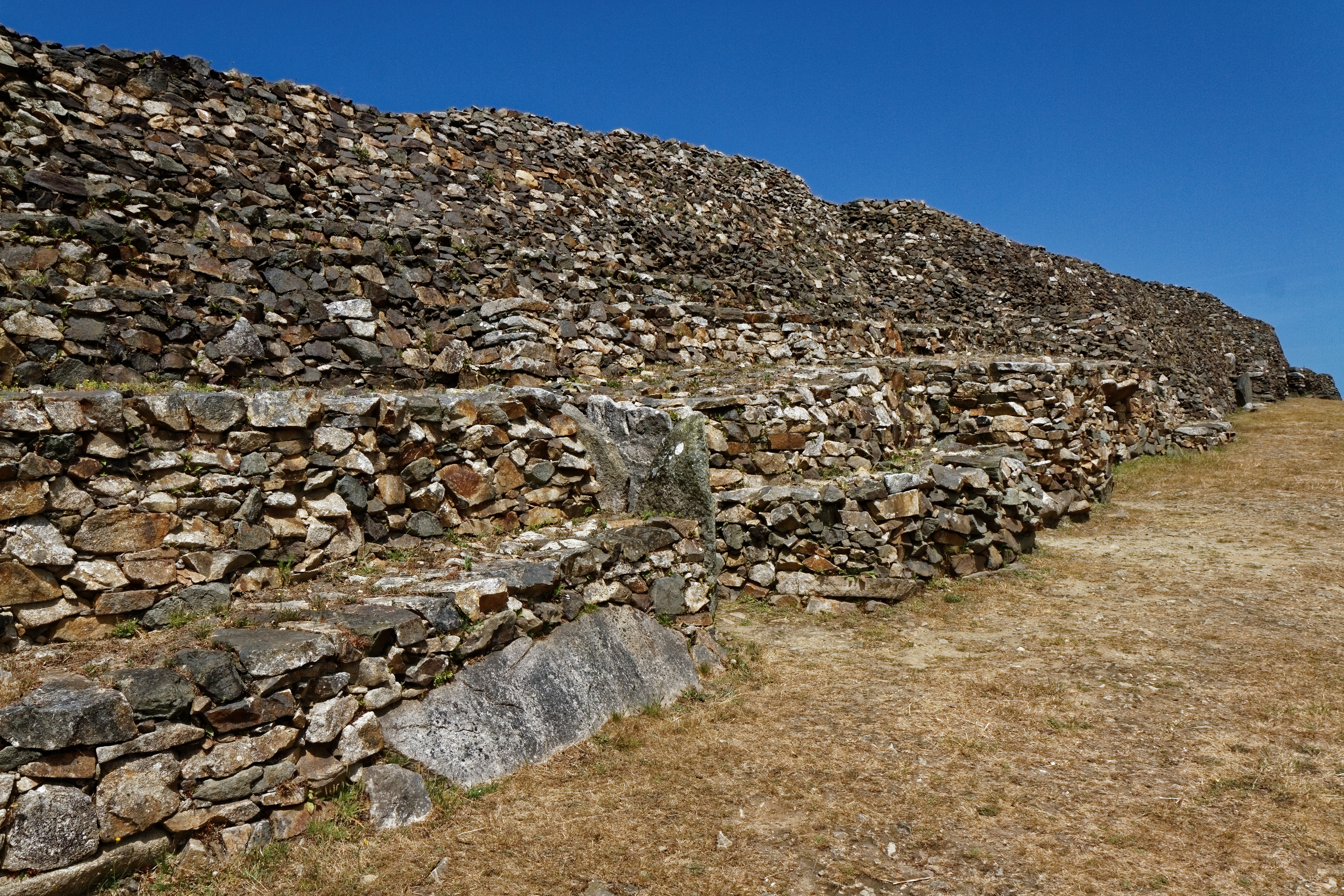 Panorama du Cairn de Barnenez à Plouezoc'h dans le Finistère. .